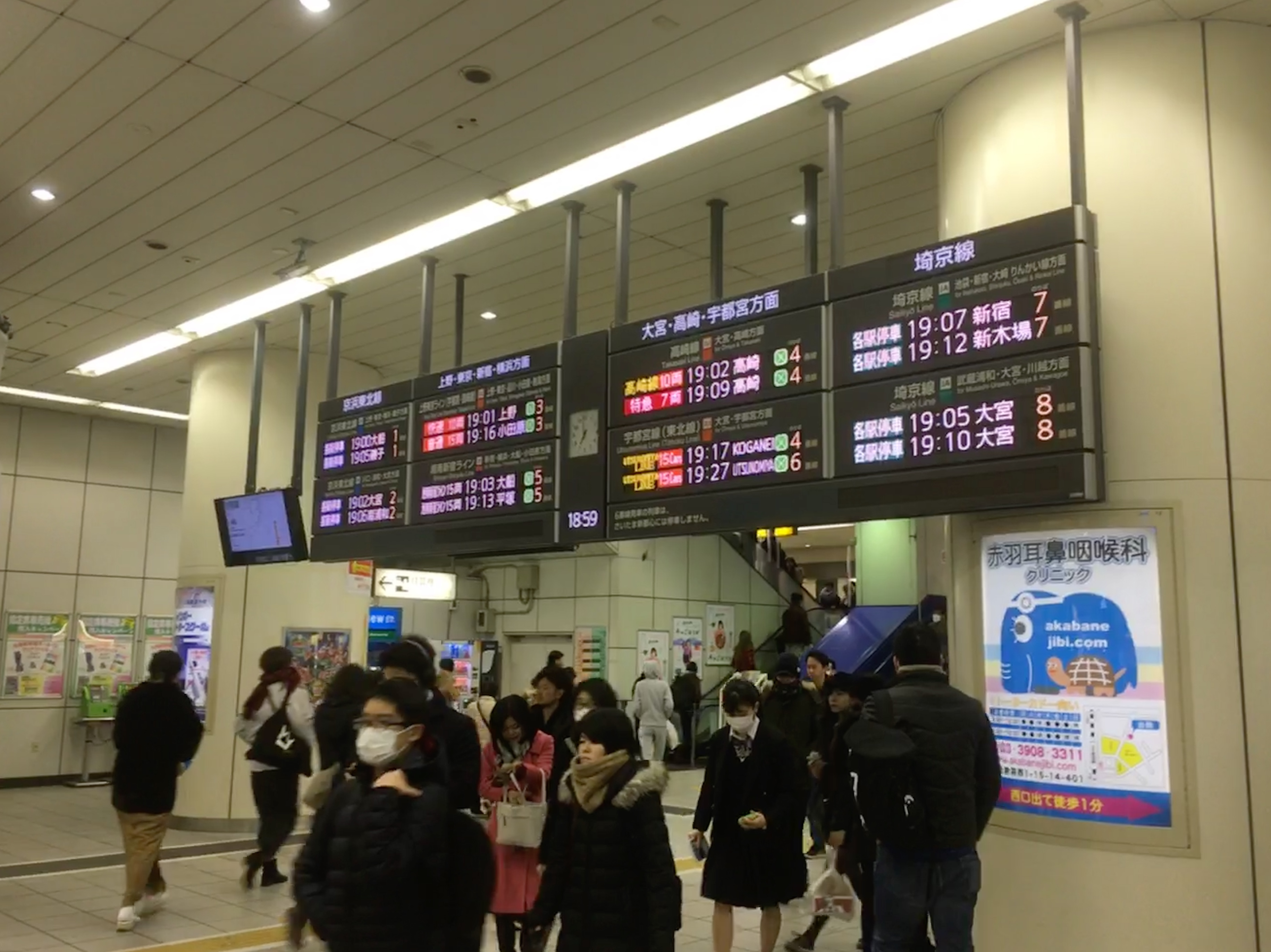 赤羽駅 (Akabane Station)